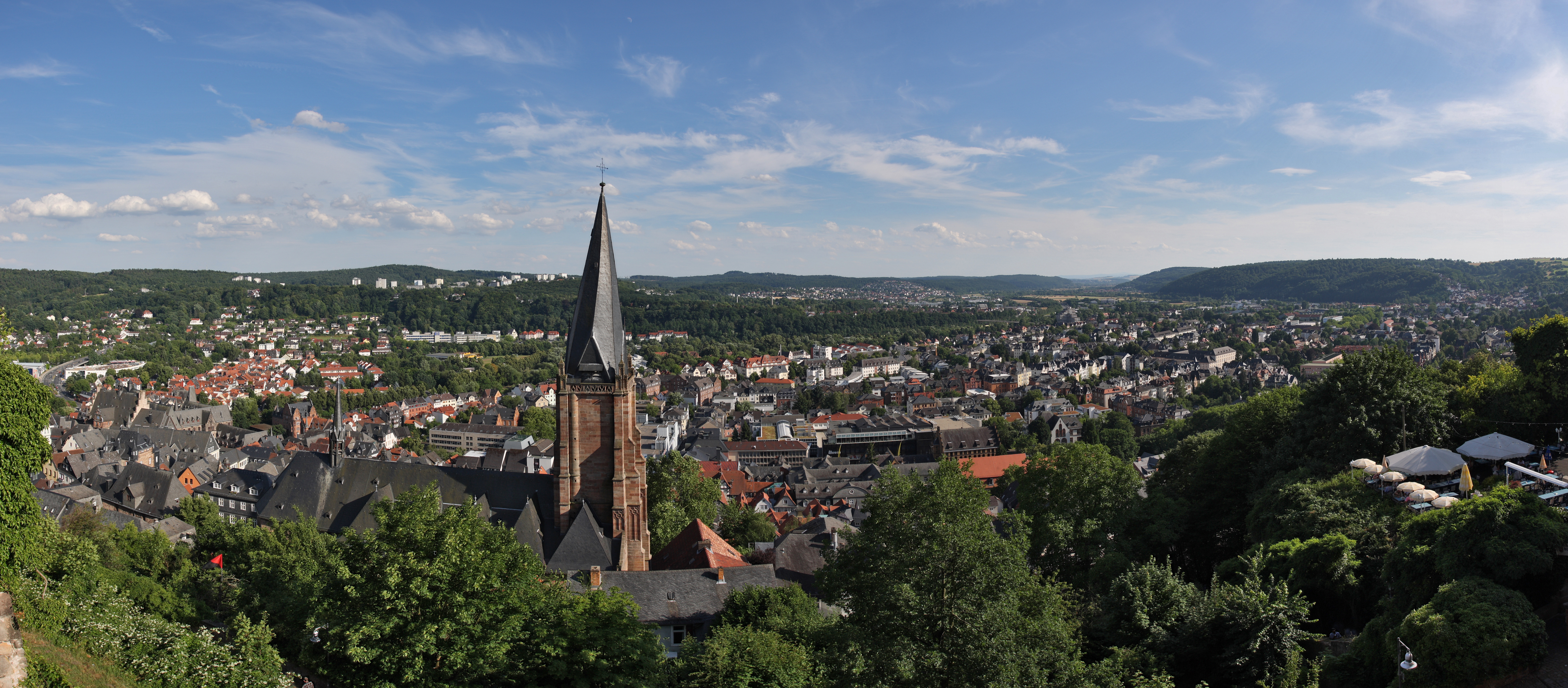 Blick vom Schloss auf das Marburger Südviertel, im Vordergrund die Lutherische Pfarrkirche